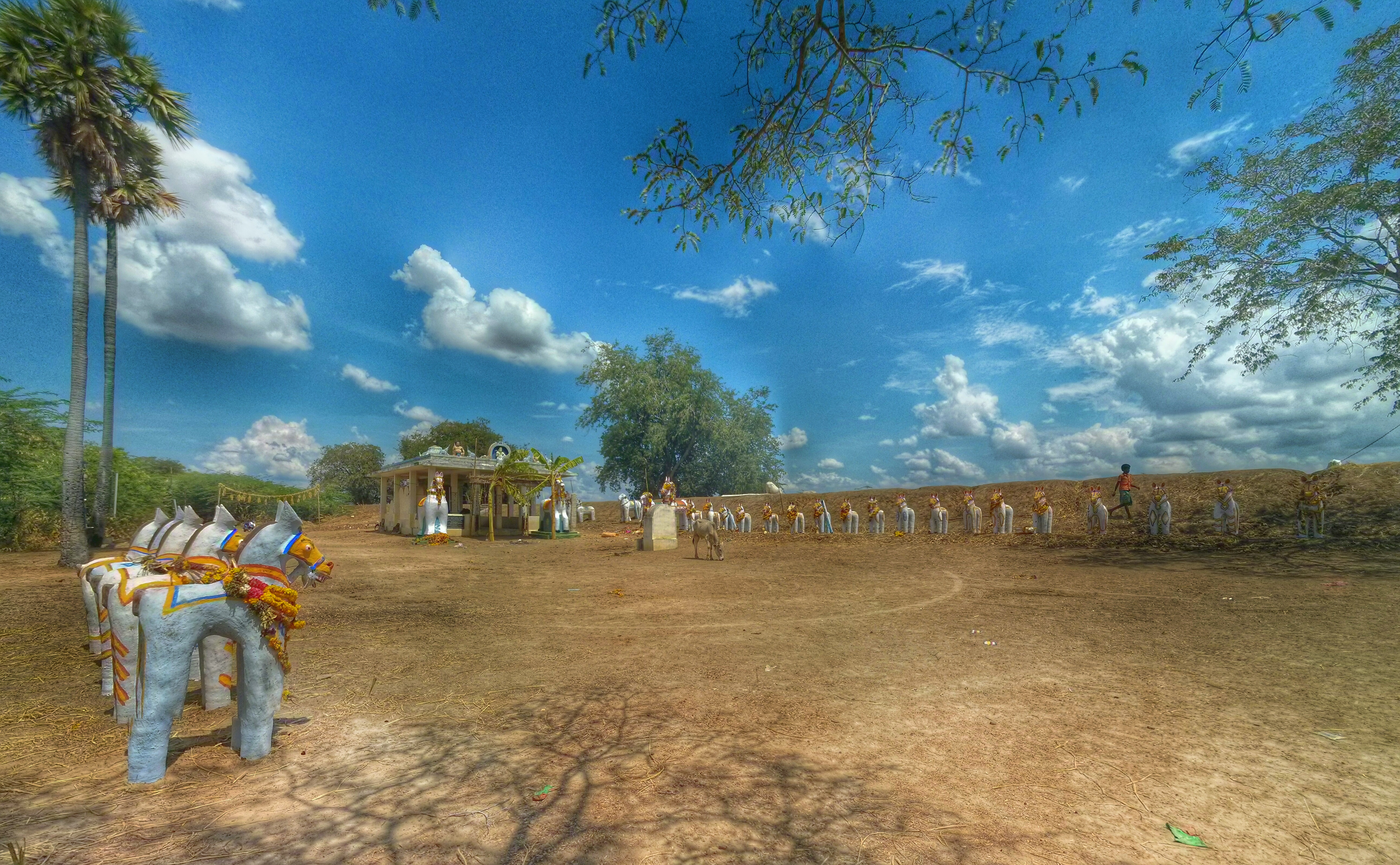 ஸ்ரீ கரந்தமலை ஐயனார் கோவில்